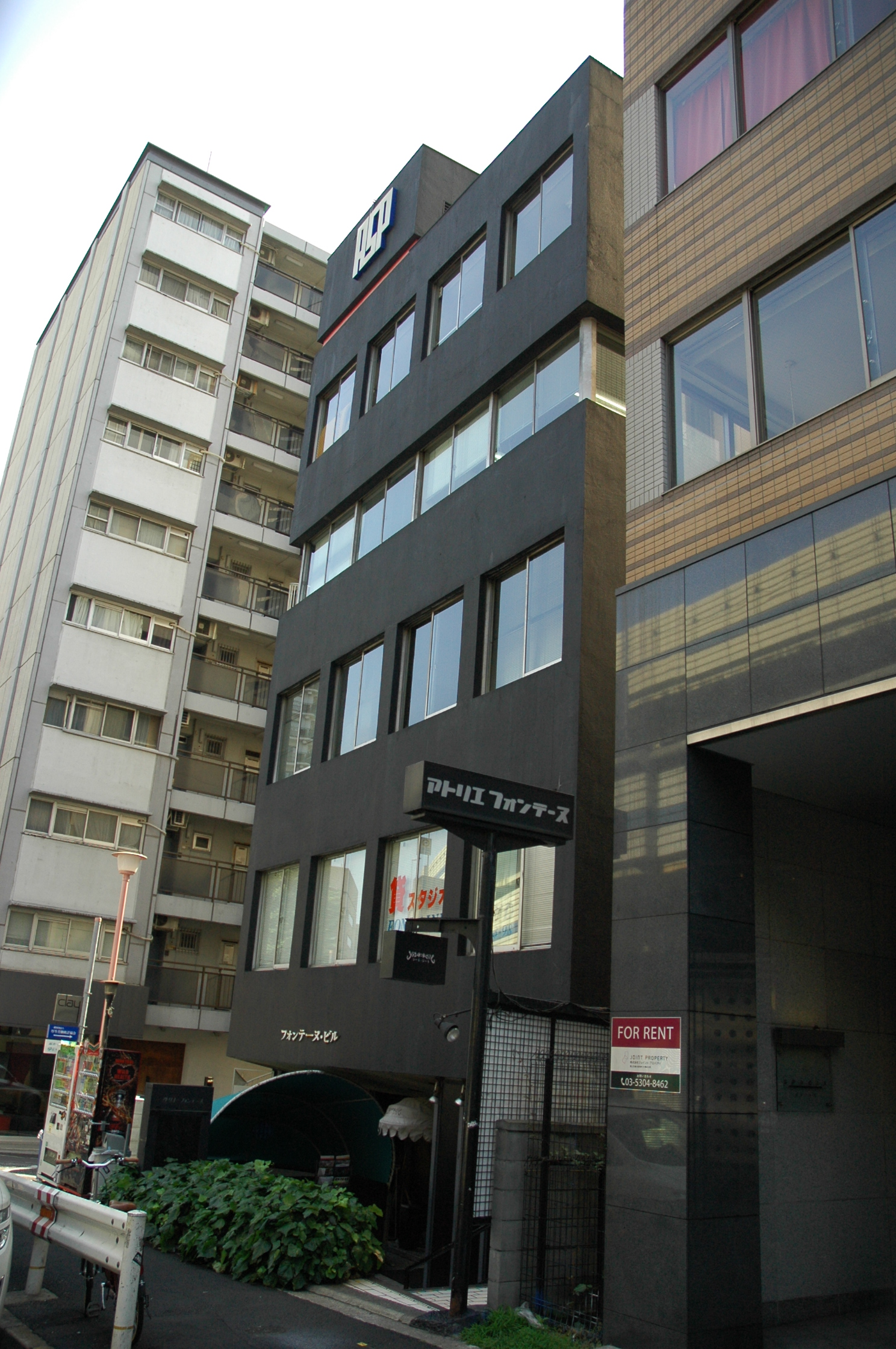 アトリエフォンテーヌの入口の様子。真ん中の黒いビルの1階に劇場への入口があった。